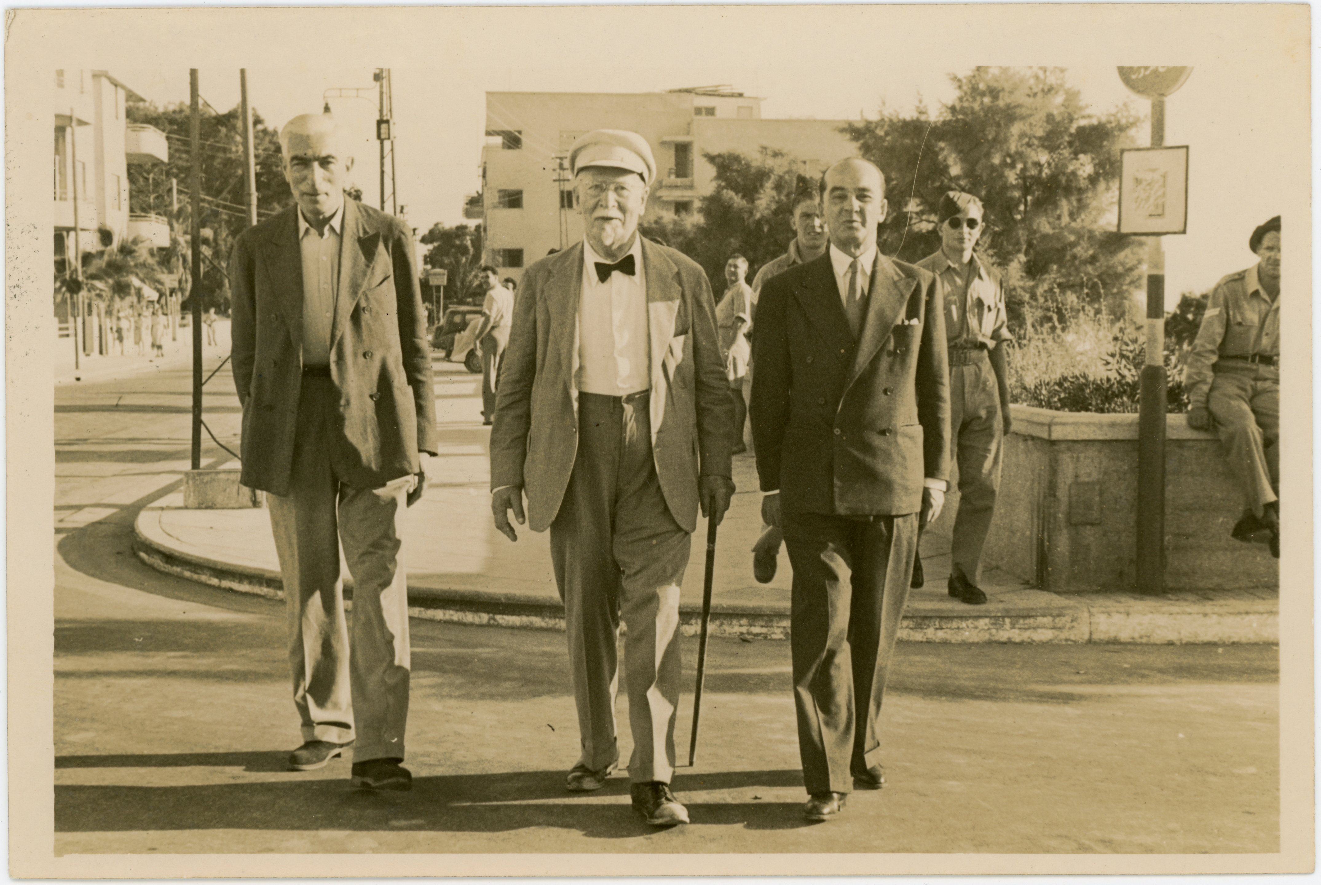 מיכאל פולק שהיה איש עסקים, יזם ותעשיין בתקופת היישוב, מייסד מפעל המלט נשר ומראשי החברה להתיישבות יהודית בארץ־ישראל מיכאל פולק ברחוב בירקון בתל אביב. תאריך התמונה רשום על גב התמונה